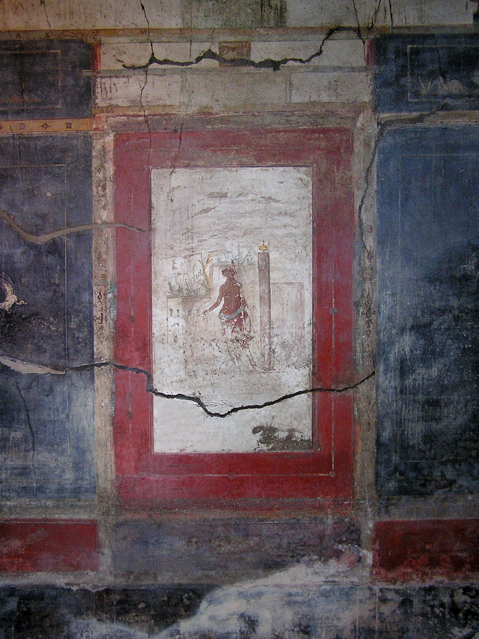 Wall painting in Pompeii, Casa dei Cei, I.6.15, Triclinium